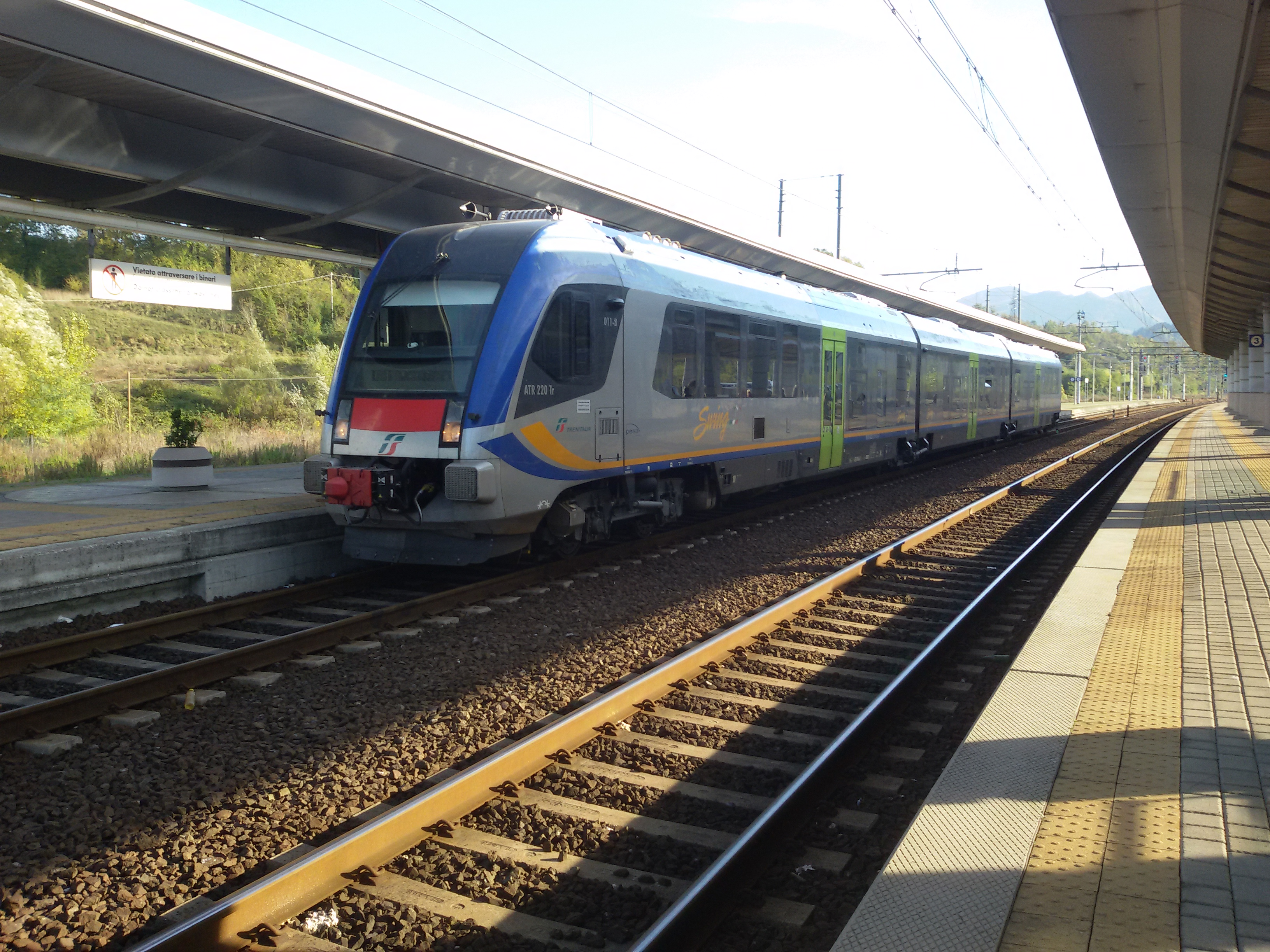 ATR.220 "Swing" ad Aulla Lunigiana, in arrivo da Pisa Centrale